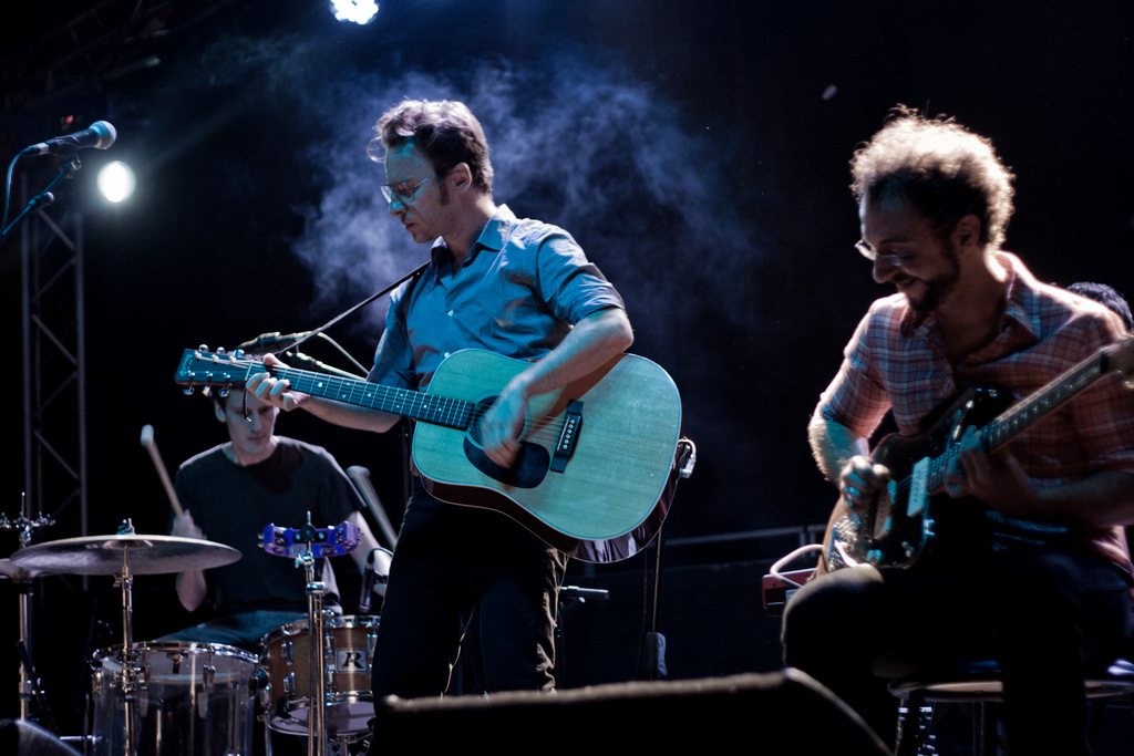 Mishima a Tarragona 2010; Alfons Serra, David Carabén i Dani Vega.